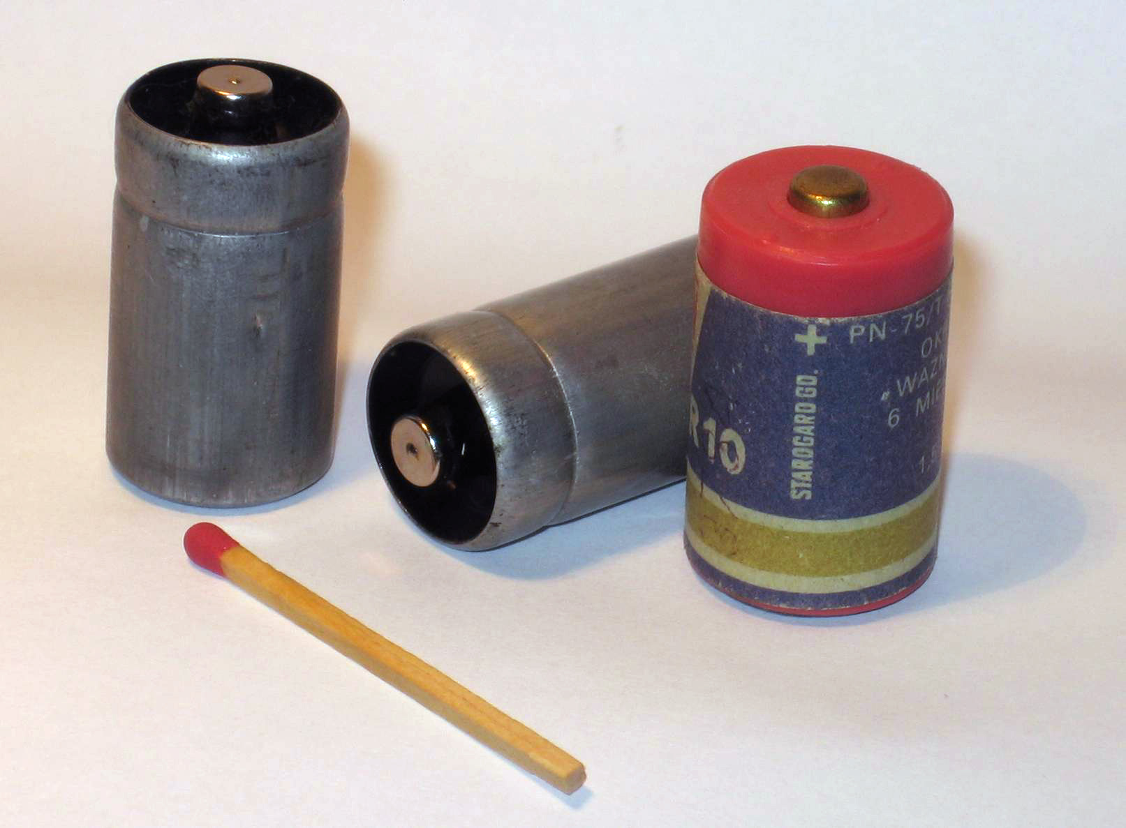 size R-10 disposable alkaline batteries